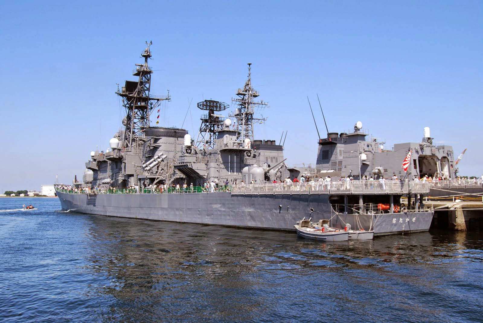 横須賀・吉倉桟橋で公開中の護衛艦はたかぜ。奥は同いかづち。サマーフェスタ2014にて。